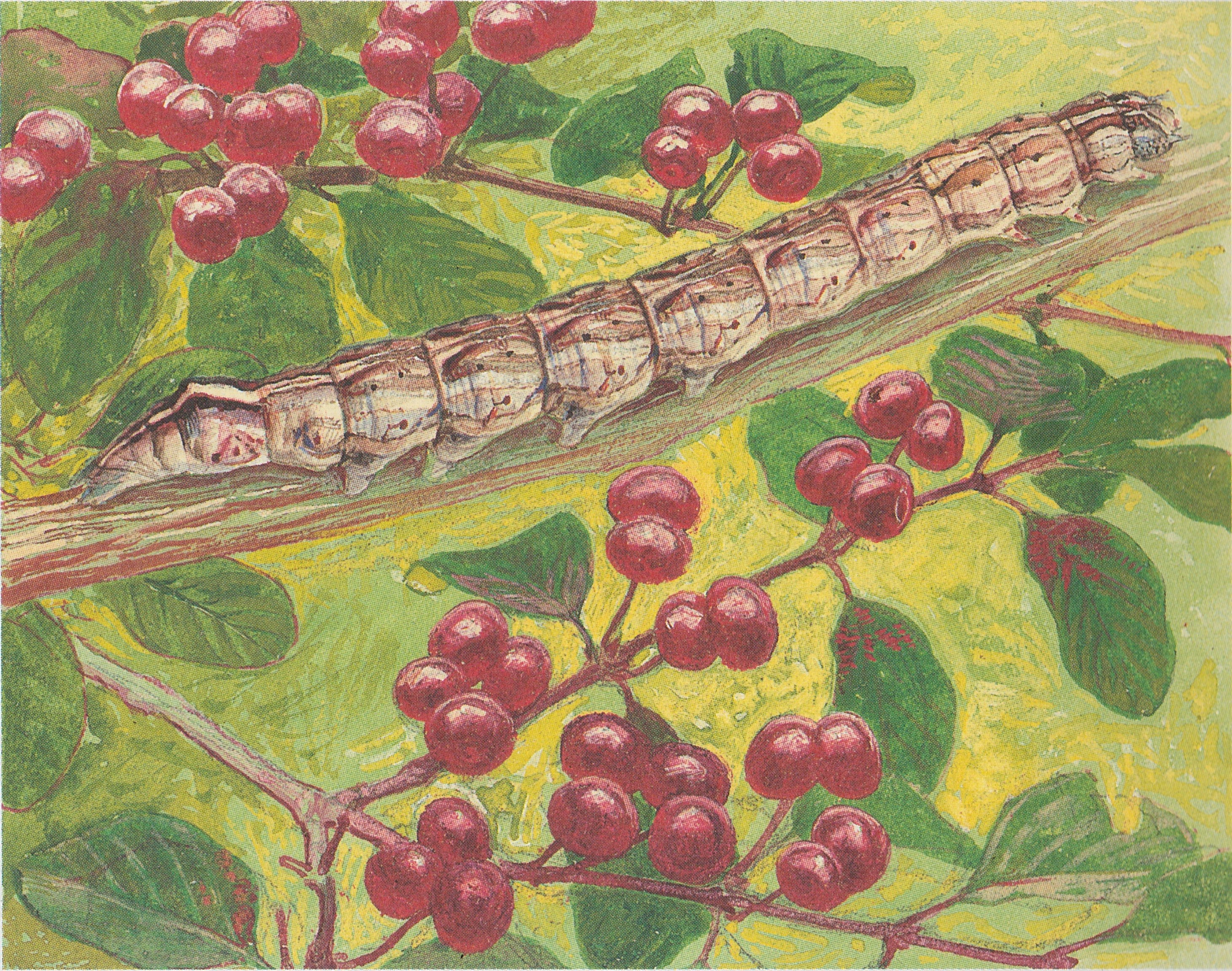 Raupen der Geissblatt-Kappeneule (Calliergis ramosa, auch Callierges ramosa) auf einer Roten Heckenkirsche (Lonicera xylosteum)